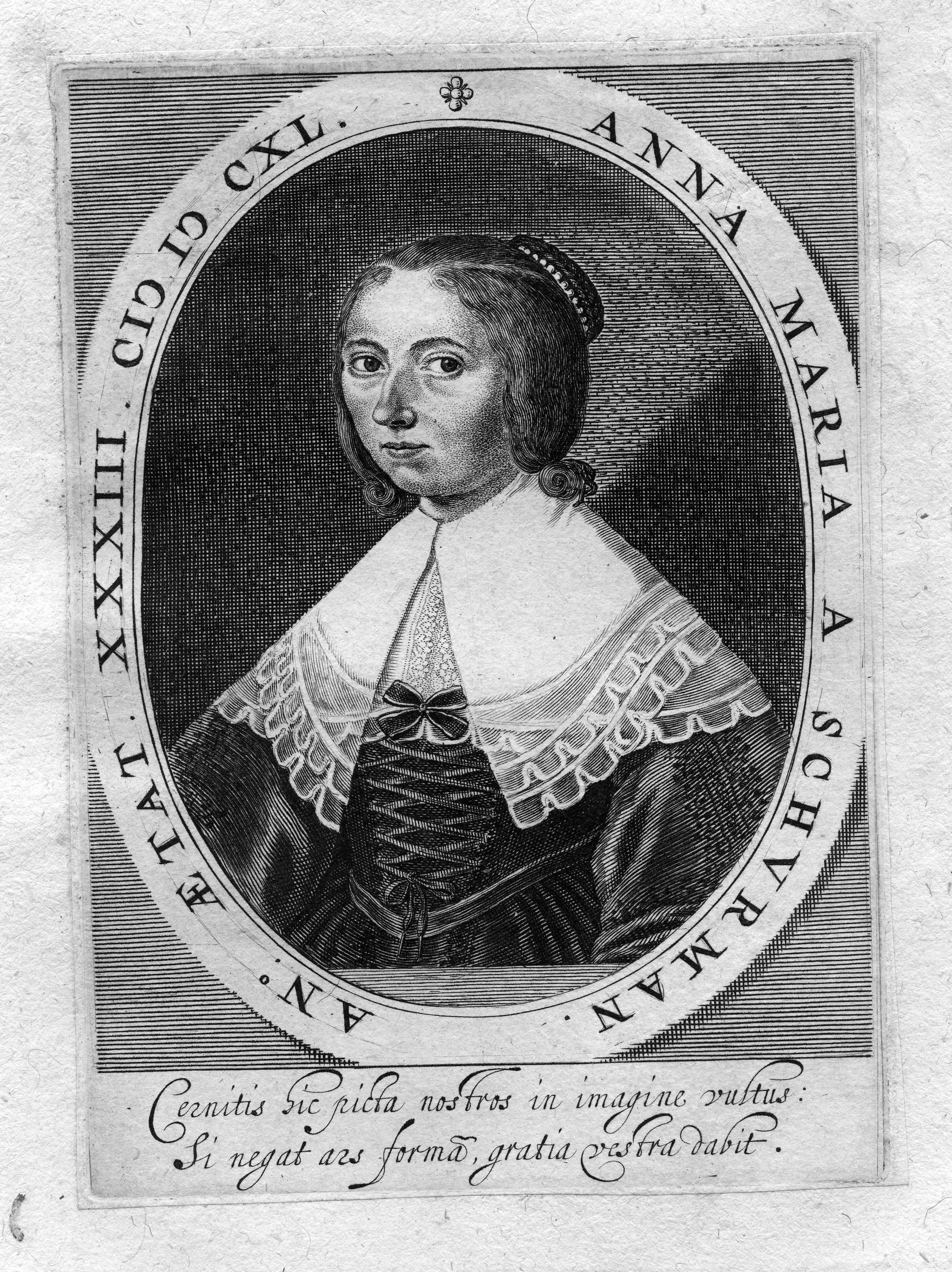 portrait gravé